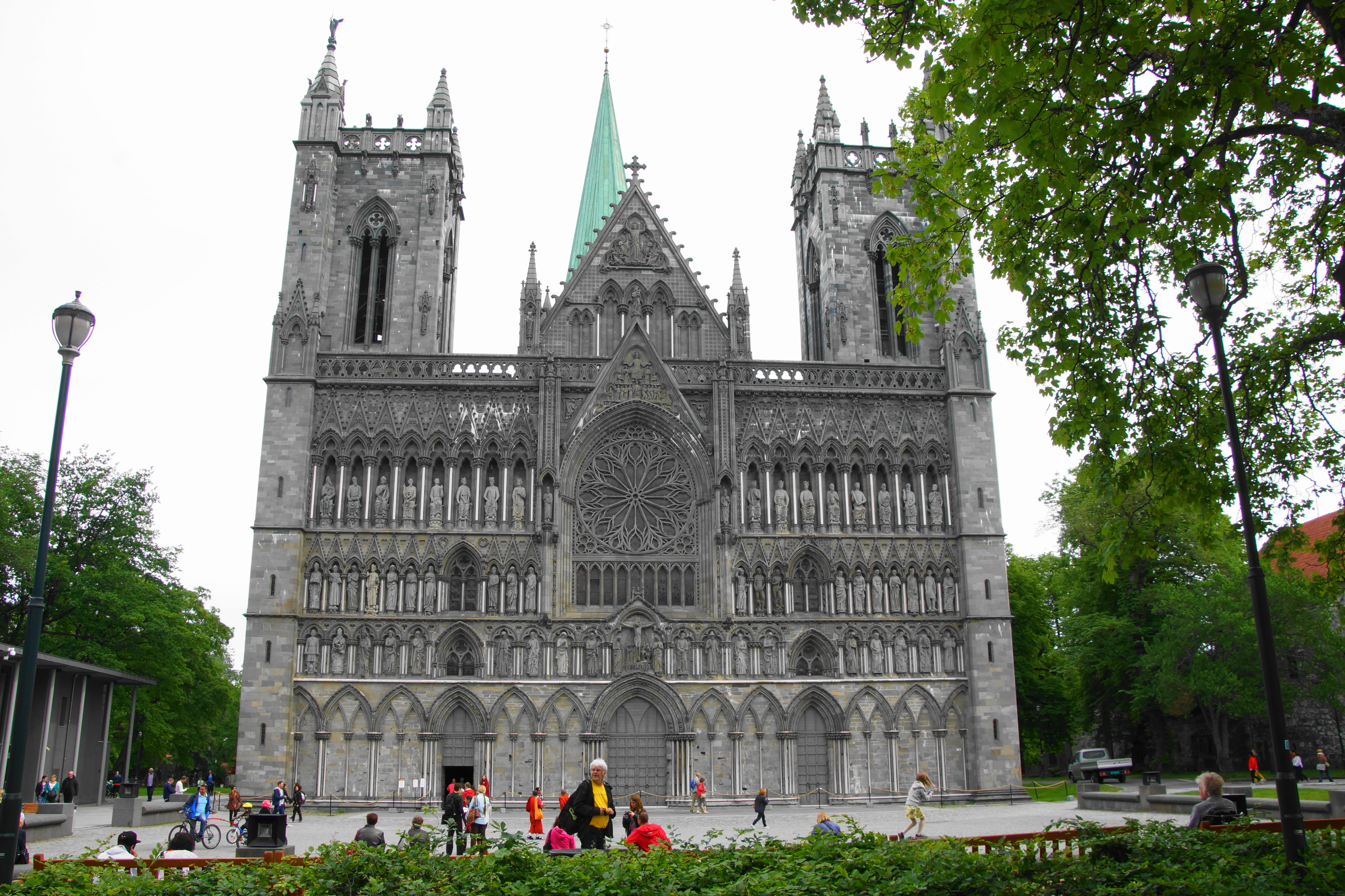 noorwegen 189